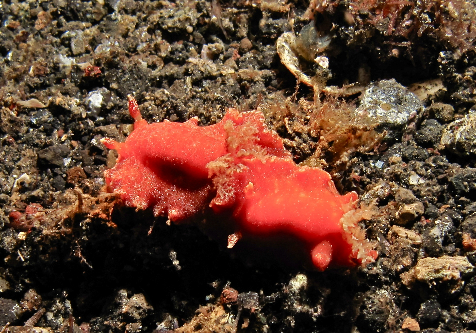 Platydoris sanguinea, Bitung, CélebesSeptentrional, Indonesia